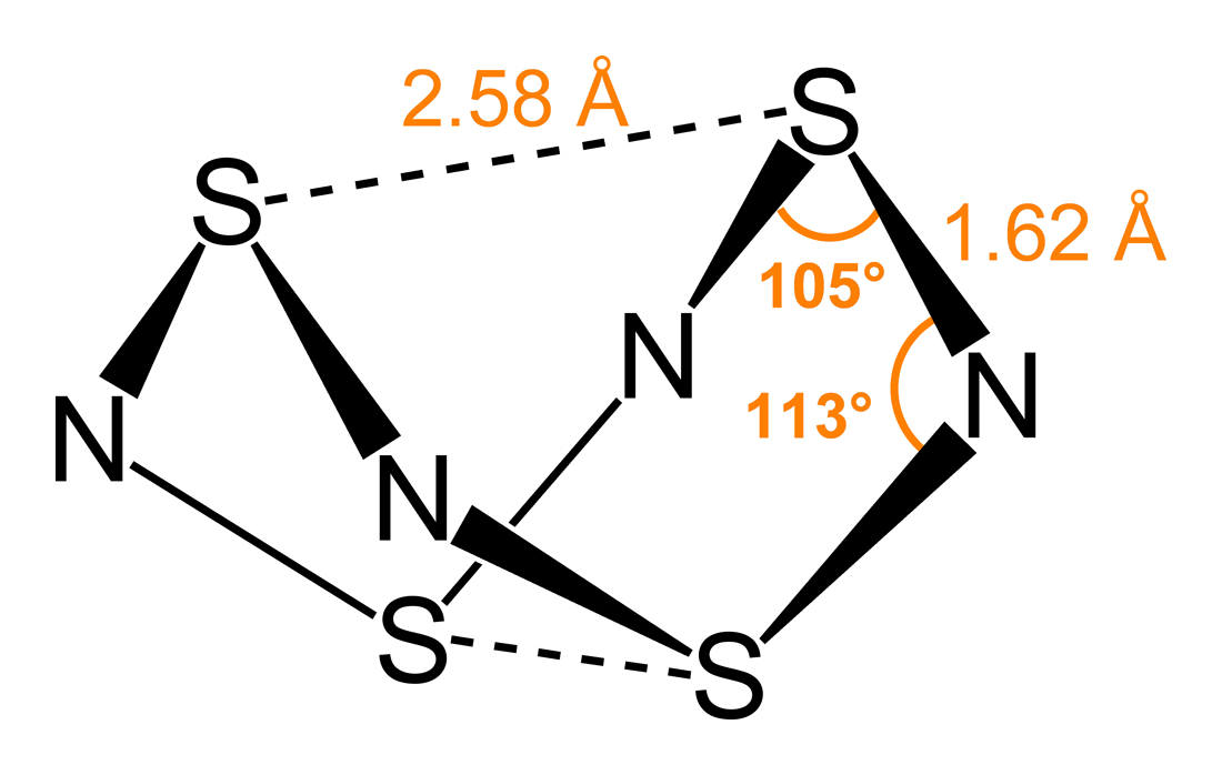 Tetrasulfur-tetranitride